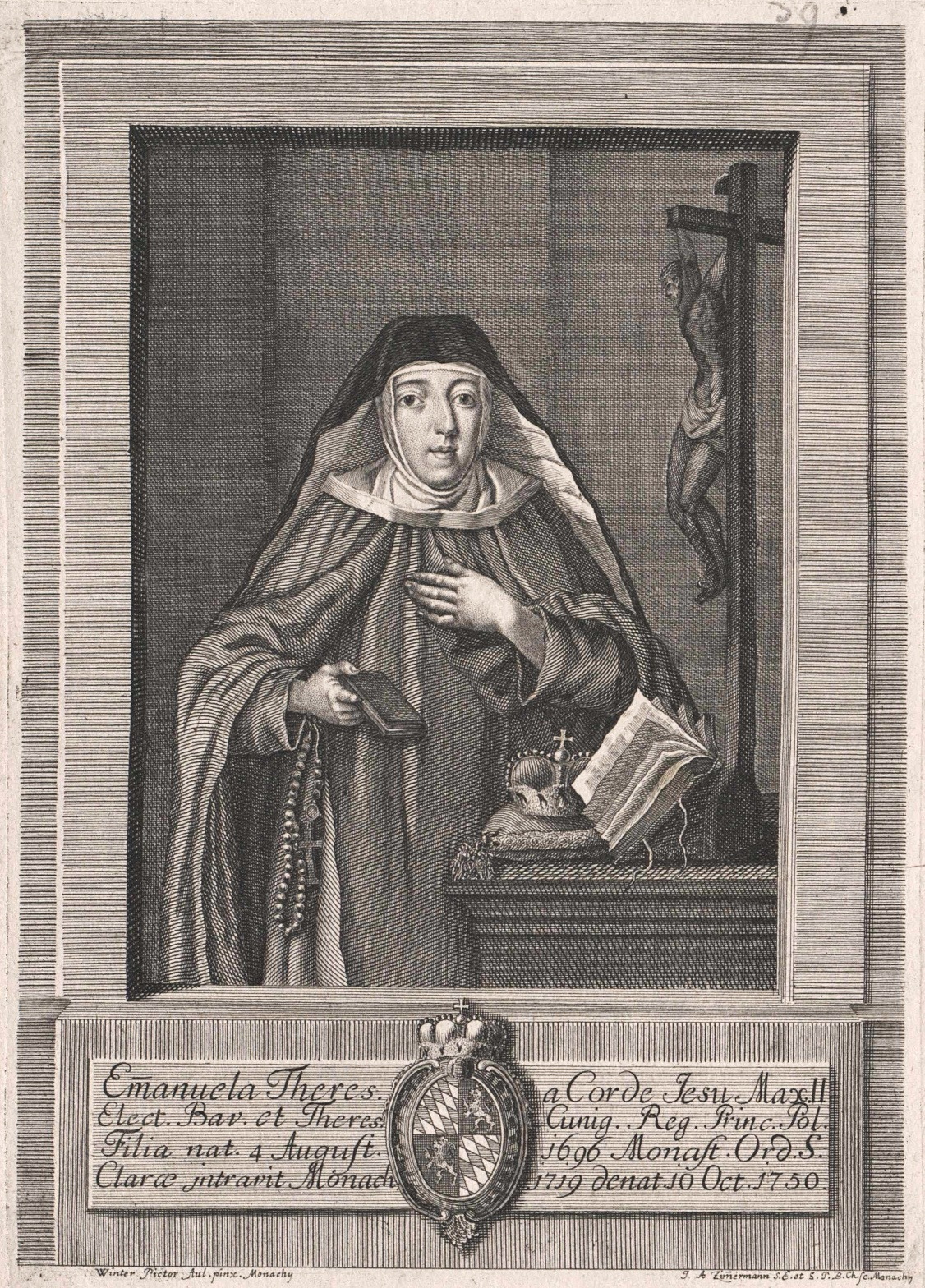 Prinzessin Maria Anna von Bayern (1696–1750), Klarissin unter dem Ordensnamen Theresa Emanuela vom Herzen Jesu. Work from: The Series Imaginum Augustae Domus Boicae, ad Genuina Ectypa Aliaque Monum Fide Digna delin. et Aaeri Incidit, Monachium (A Series of Portraits of the Noble House of Bavaria...) is a genealogical series of portraits of members of the House of Wittelsbach engraved by Joseph Anton Zimmermann after contemporary and old portraits by different artists, and published since 1773.